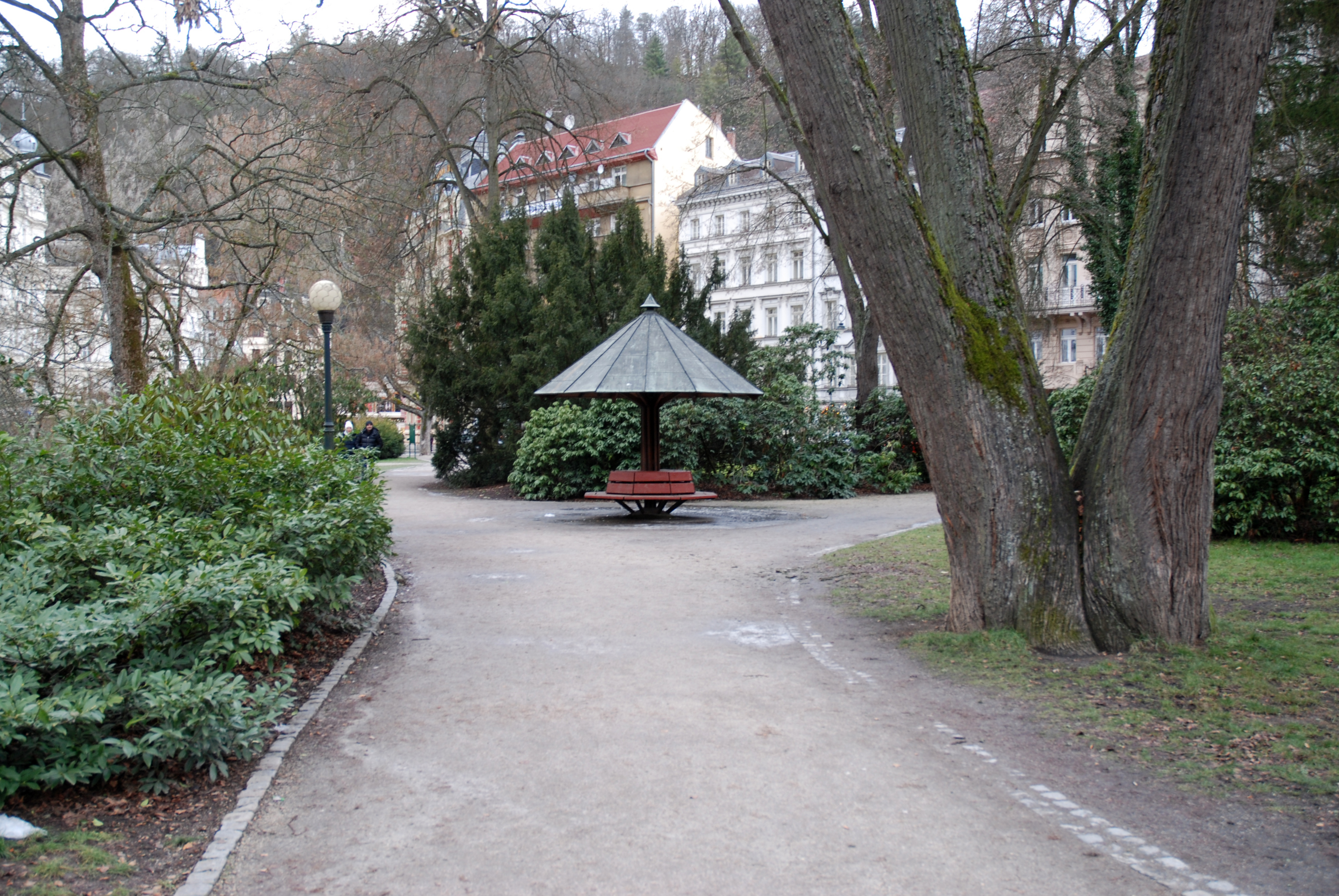 Altán v sadech Karla IV. v Karlových Varech